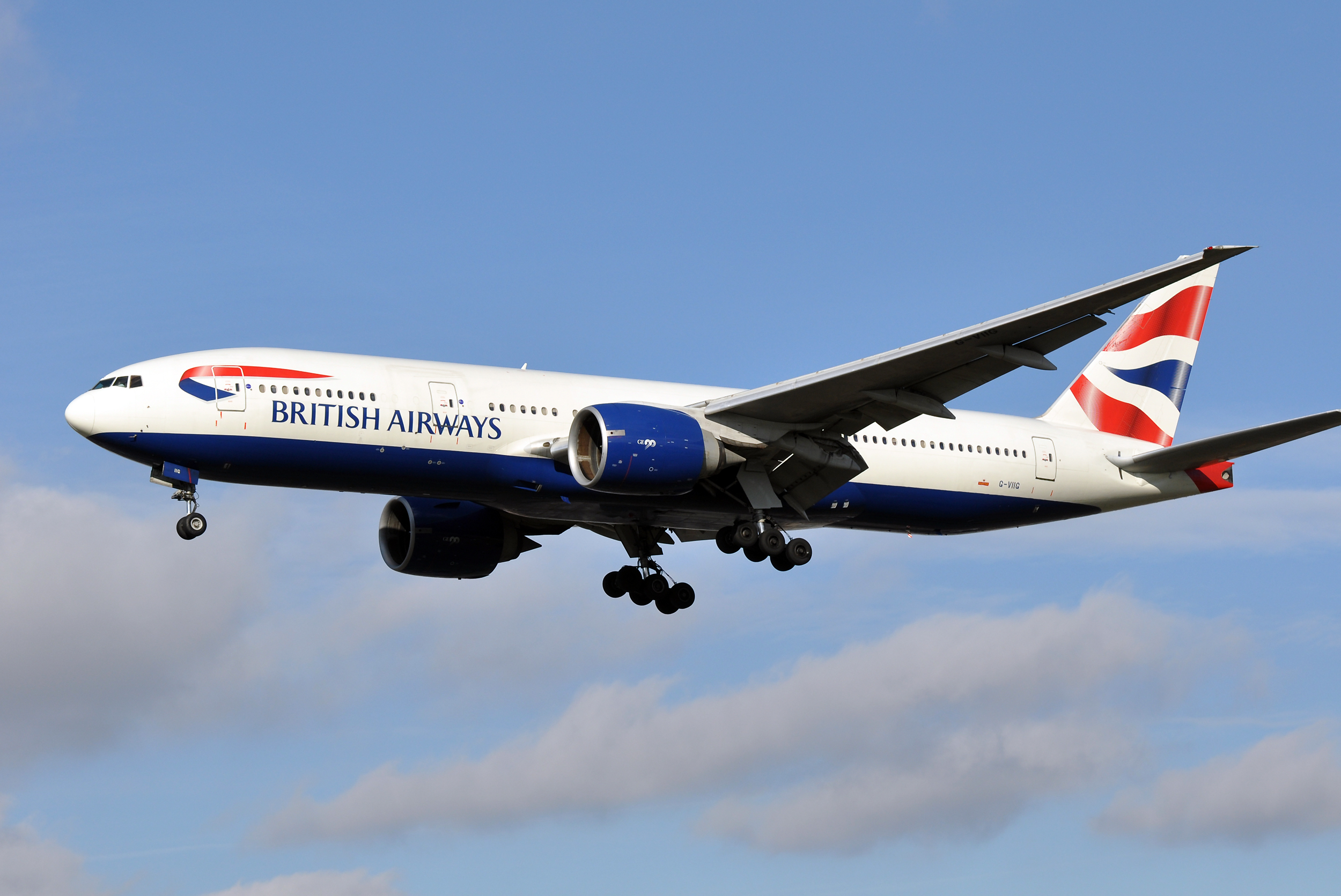 MSN 27489 B777-236 ER BRITISH AIRWAYS LHR